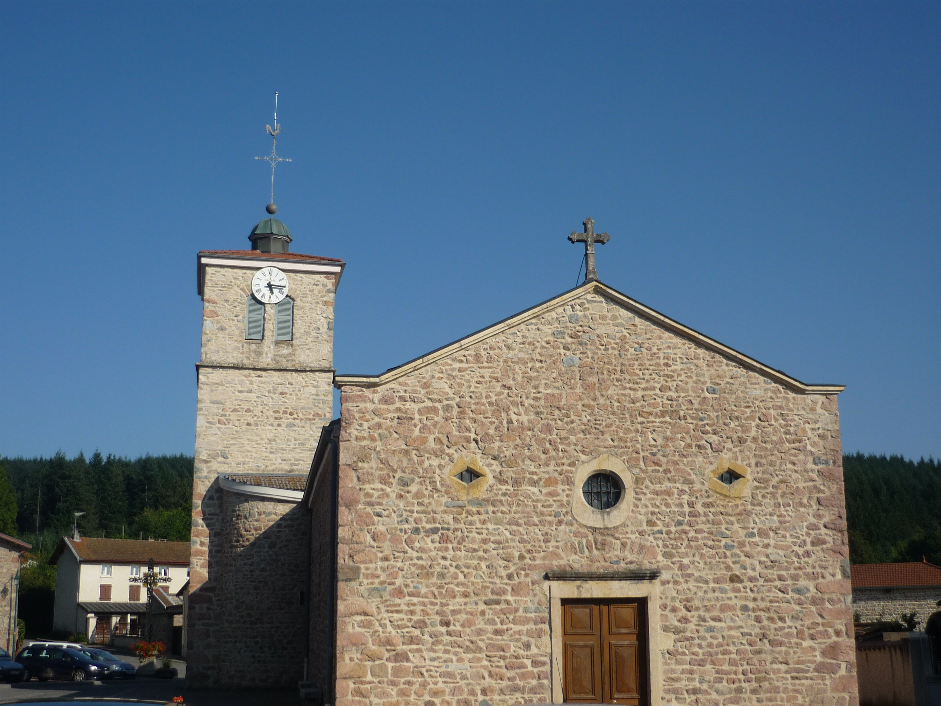 Église de Meaux-la-Montagne